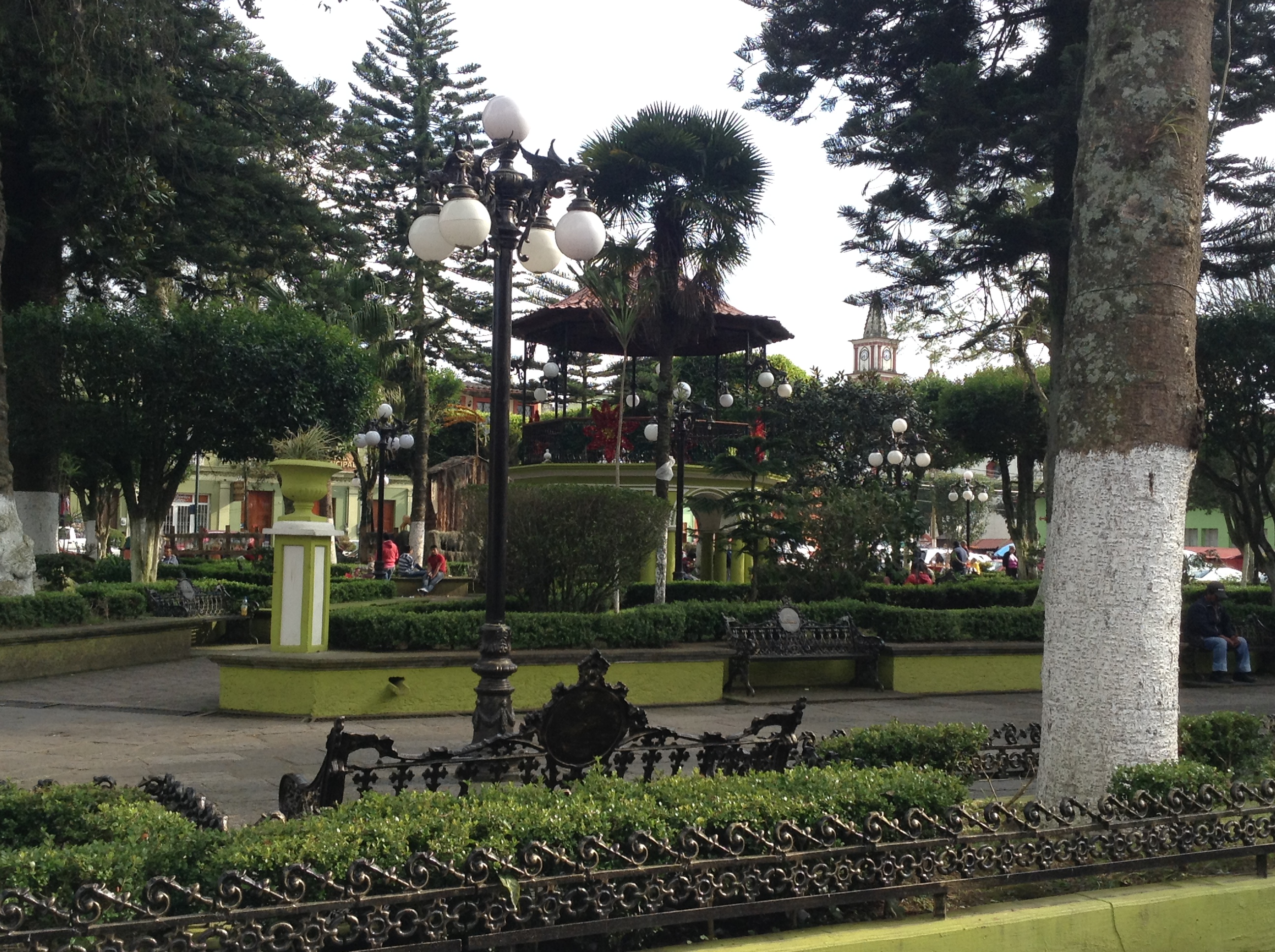 Parque Naolinco